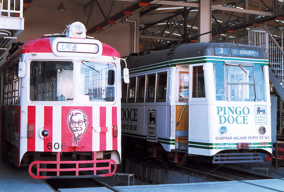 土佐電鉄 整備中の910形（右）と600形606（左）